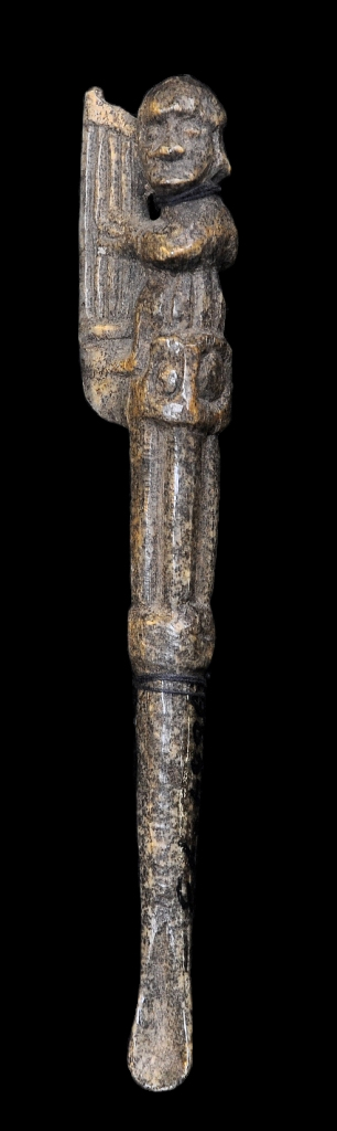 Вухачыстка з Навагрудка